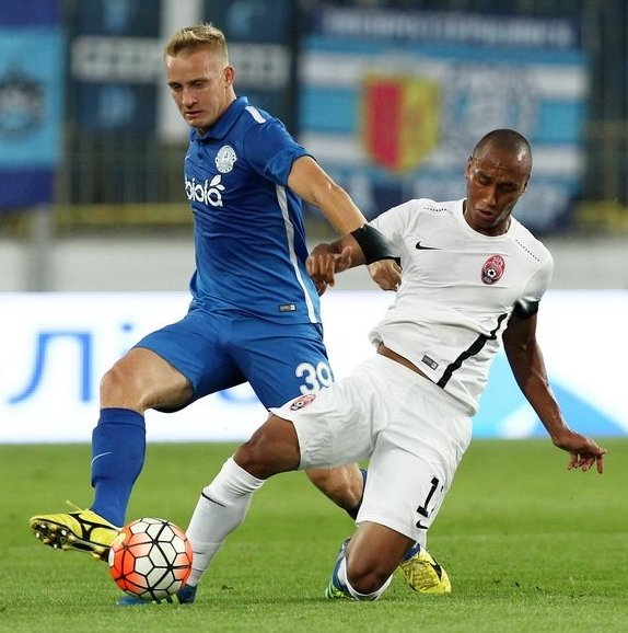 Александр Сваток во время матча Днепр — Заря